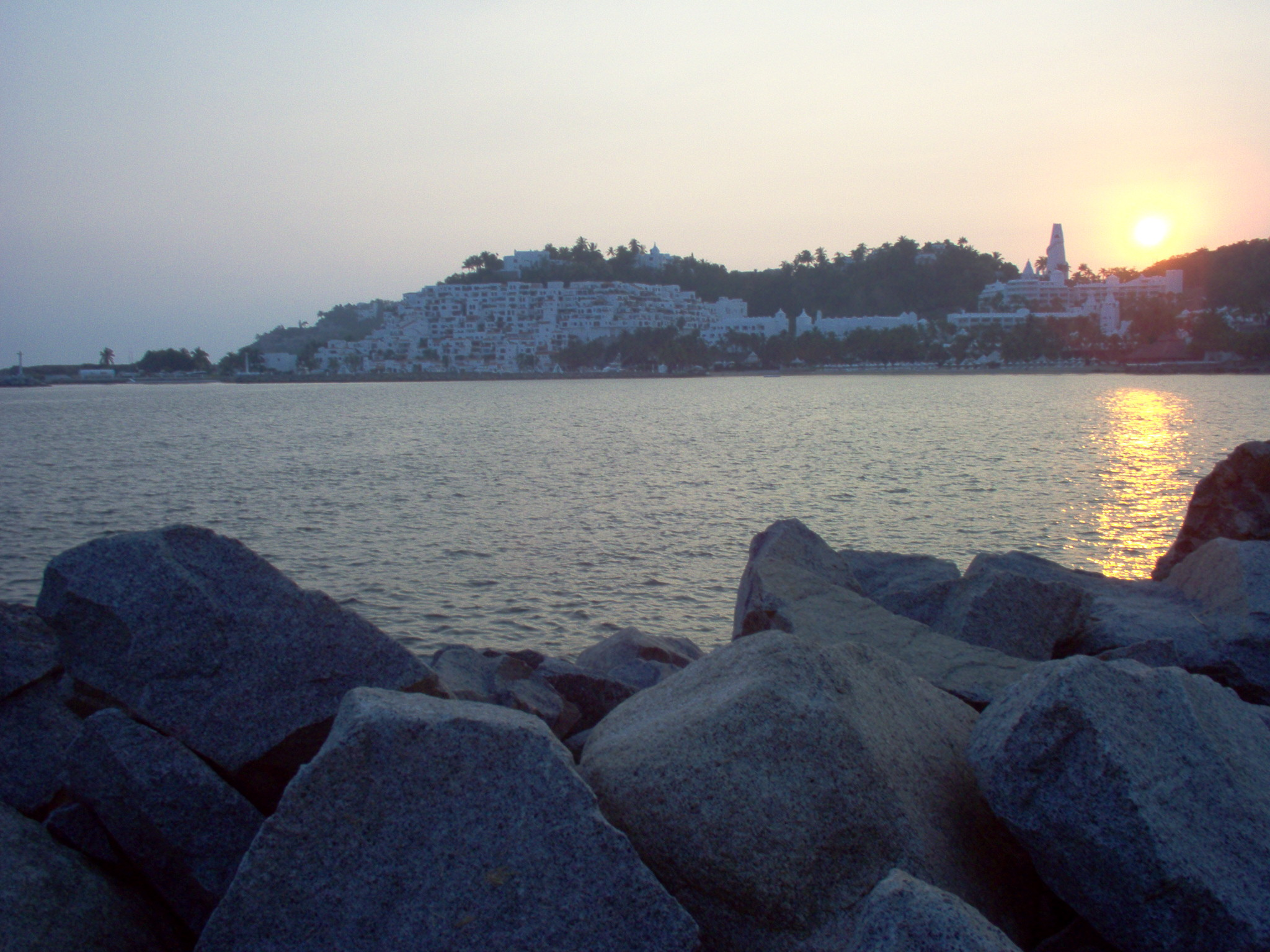 Atardecer en Las Hadas, Manzanillo, Colima, México.